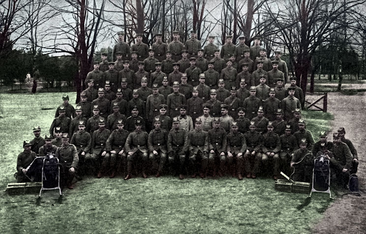 Description